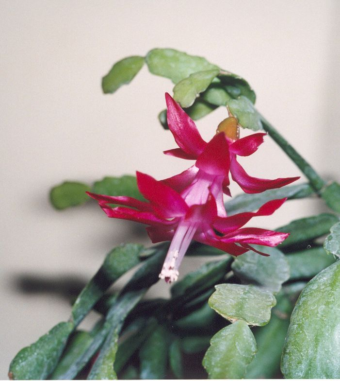 Schlumbergera X buckleyi (Rhipsalideae; Cactaceae; Planta) kaktusz virága